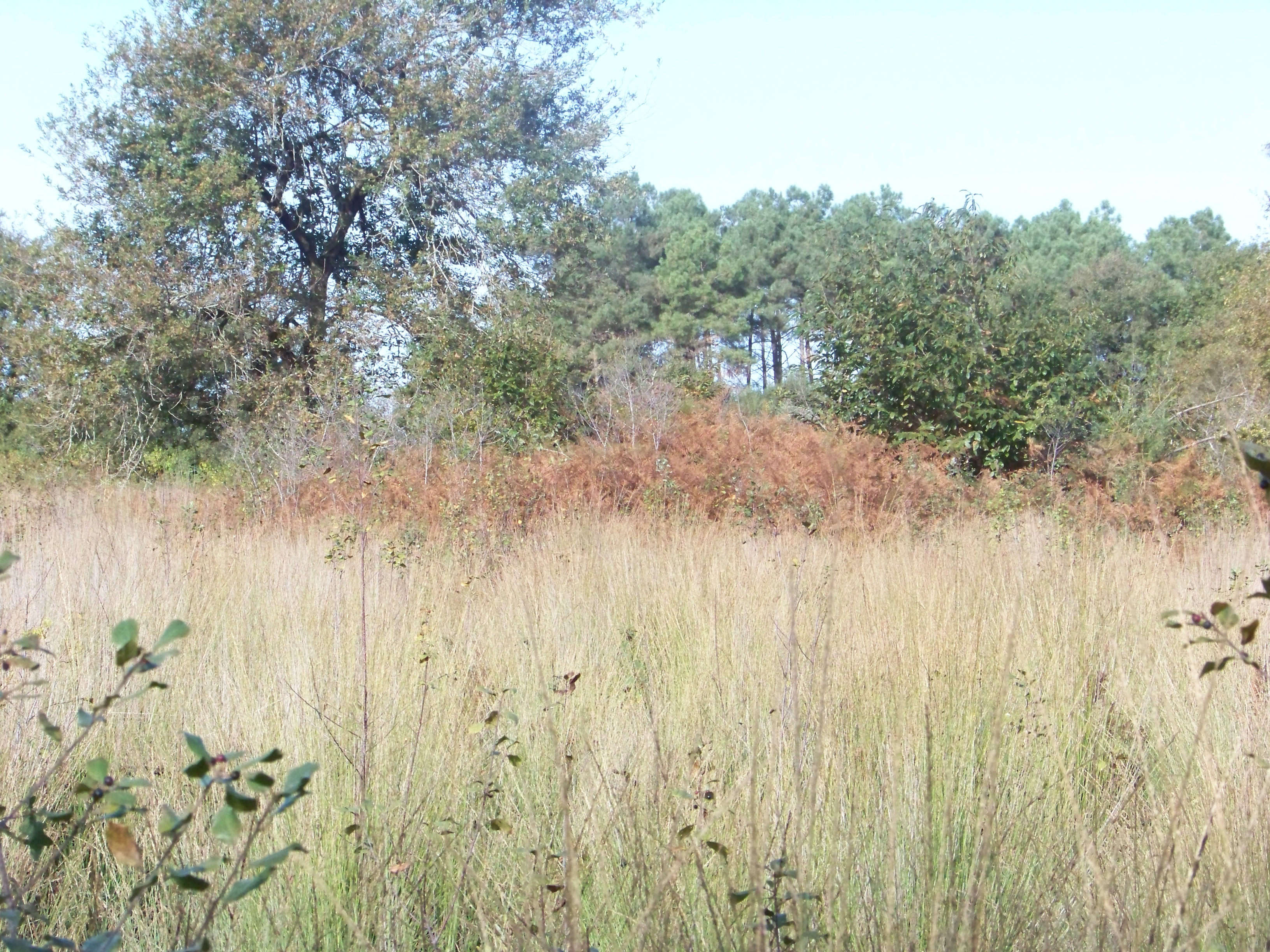 Tertres funéraires d'Arboucave